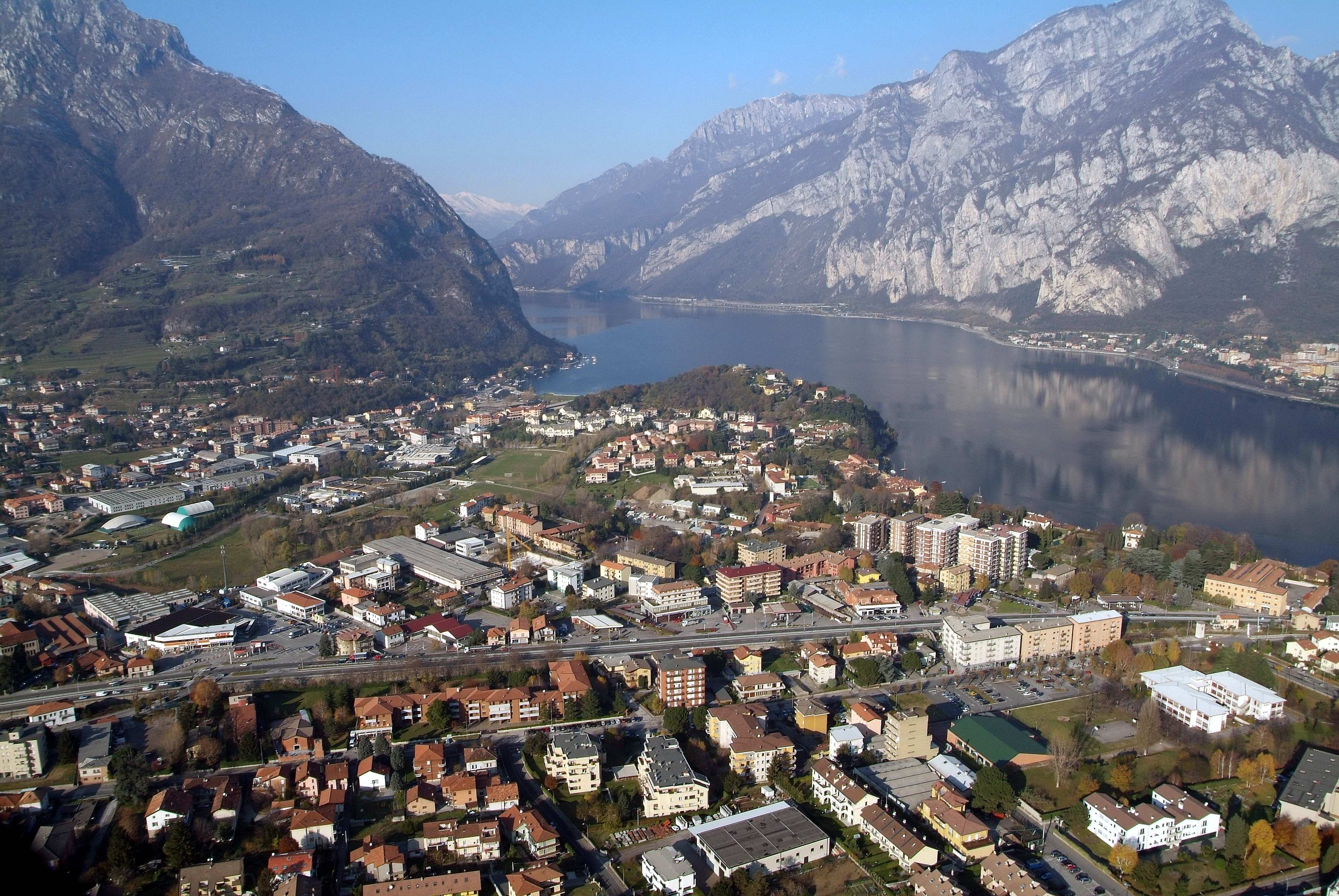 Vista panoramica di Malgrate dall'alto